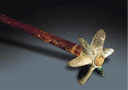 Principal arma utilizada por los Incas